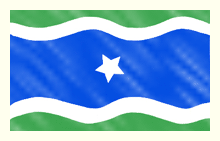 Bandeira do município de Entre Rios de Minas, Minas Gerais, Brasil.